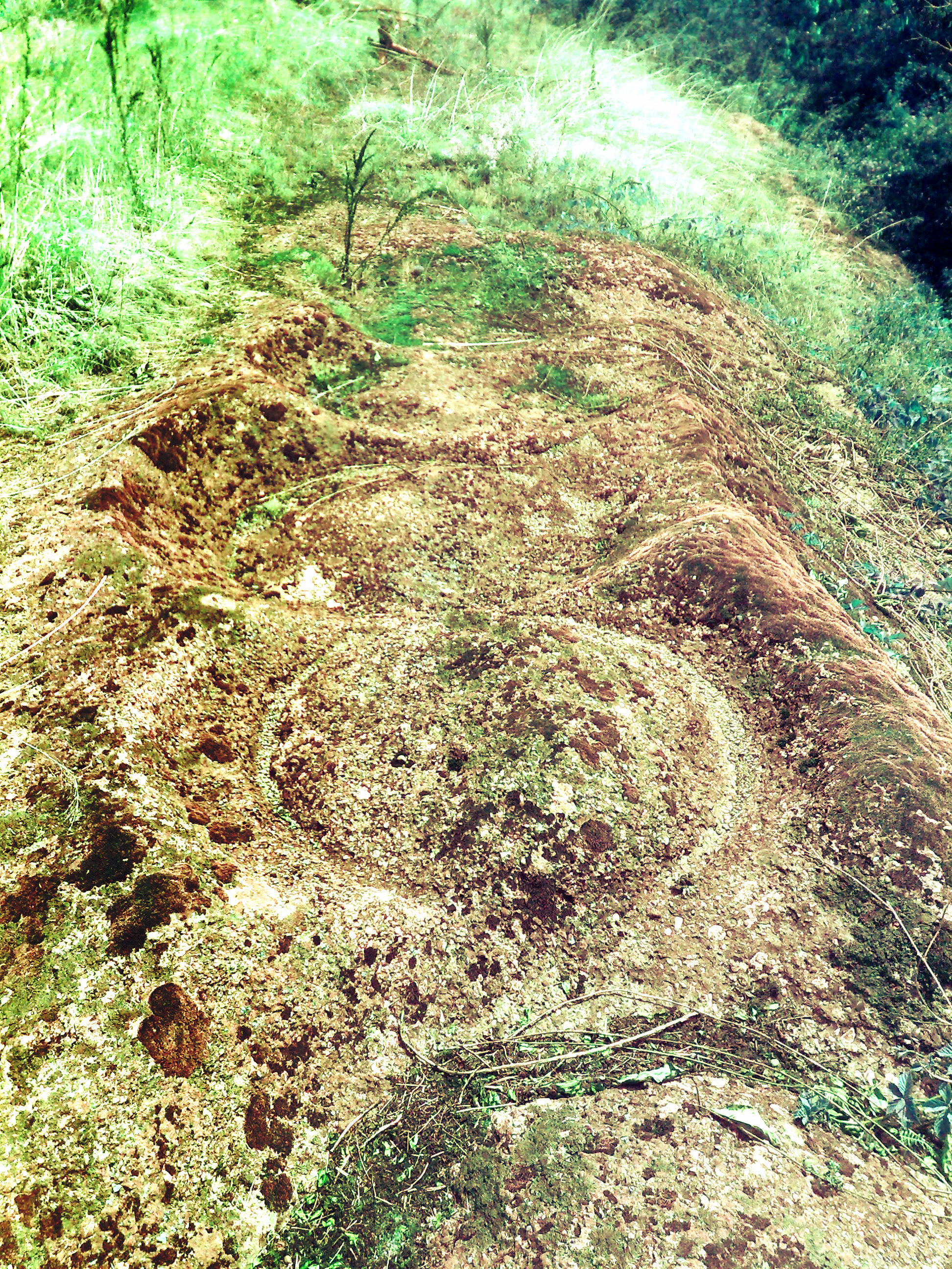 Sechen kamuk Tryavna BG